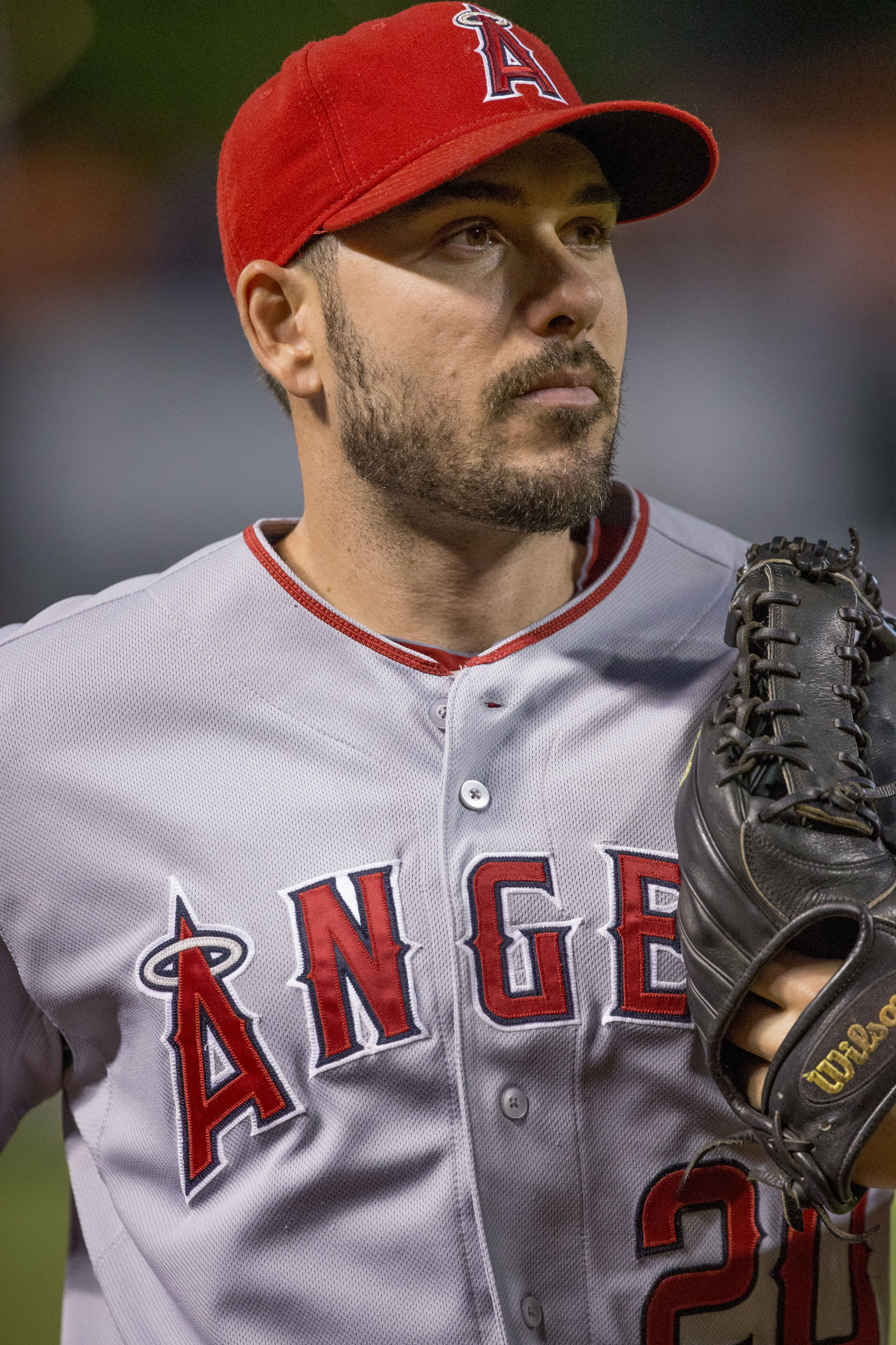 Angels at Orioles 5/16/15